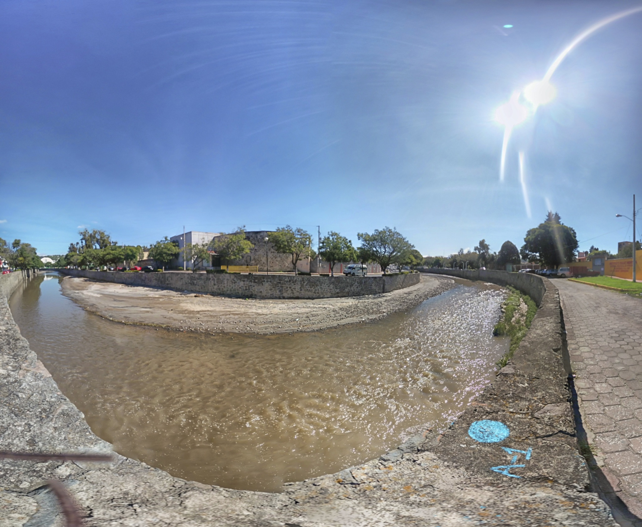 Река Сауапан